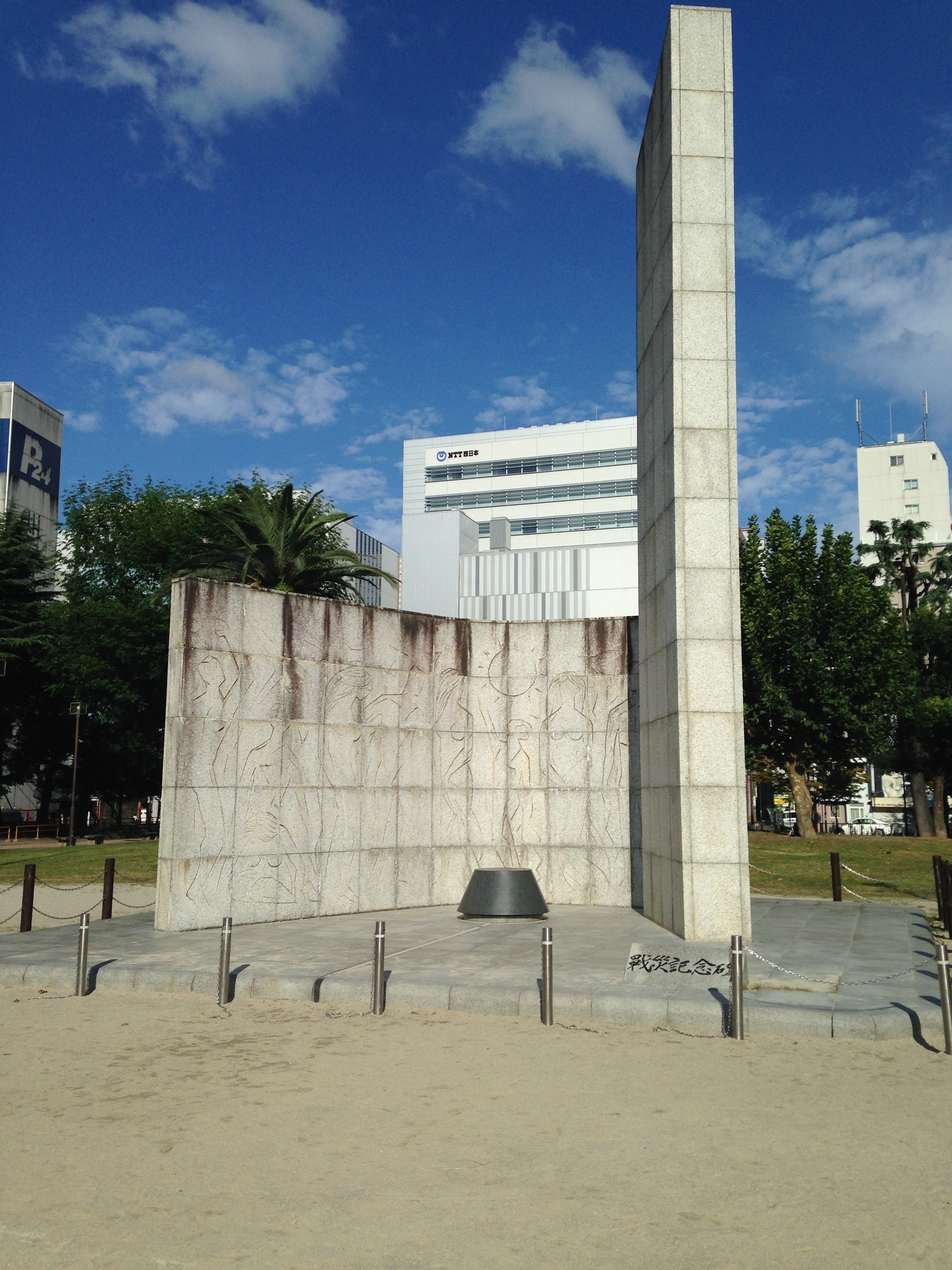 冷泉公園にある戦災記念碑